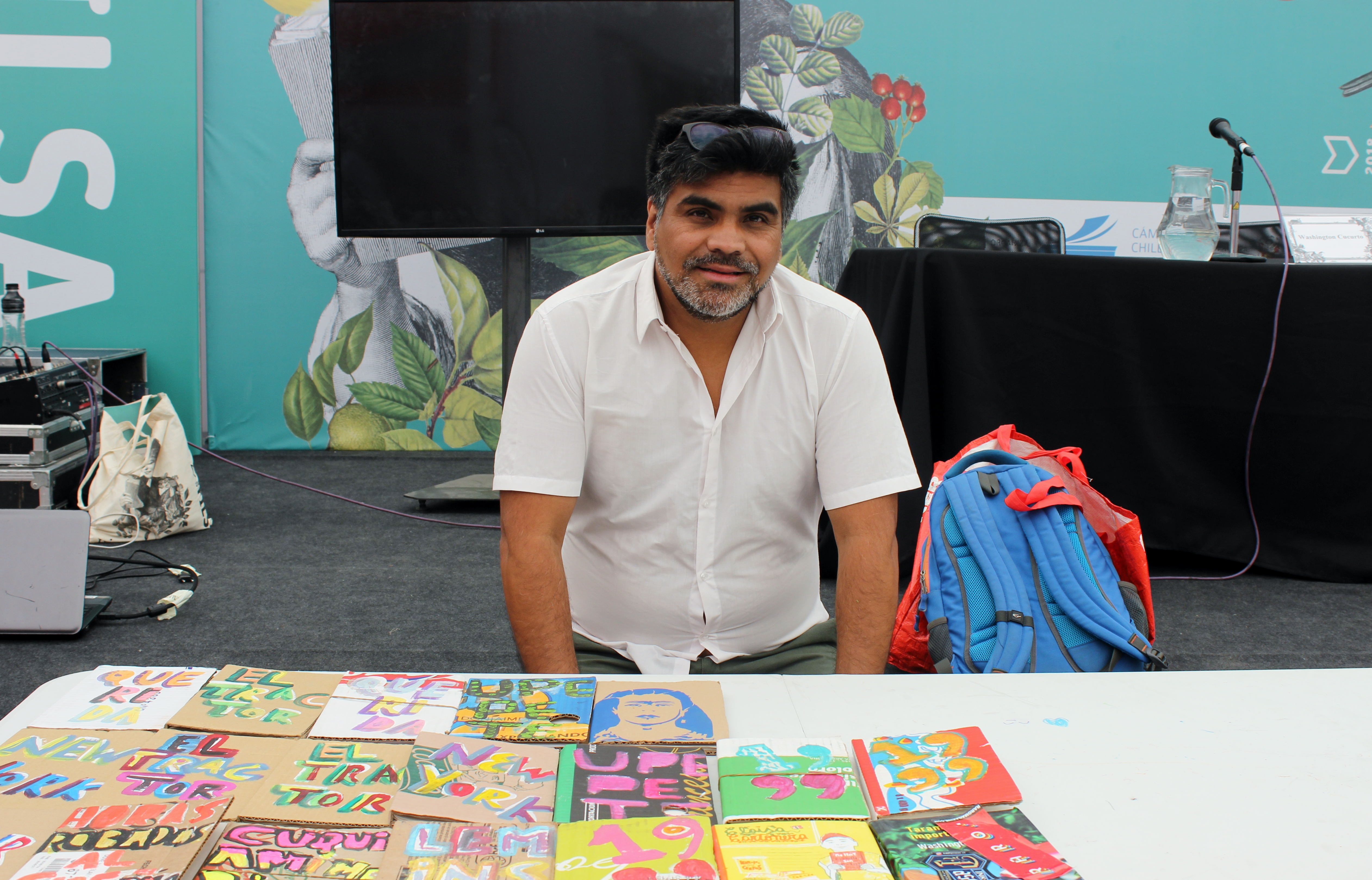 El escritor y editor cartonero argentino Wáshington Cucurto en la Feria Internacional del Libro de Santiago 2018.